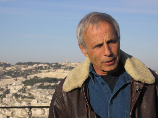 דן חמיצר על רקע ירושלים 2007